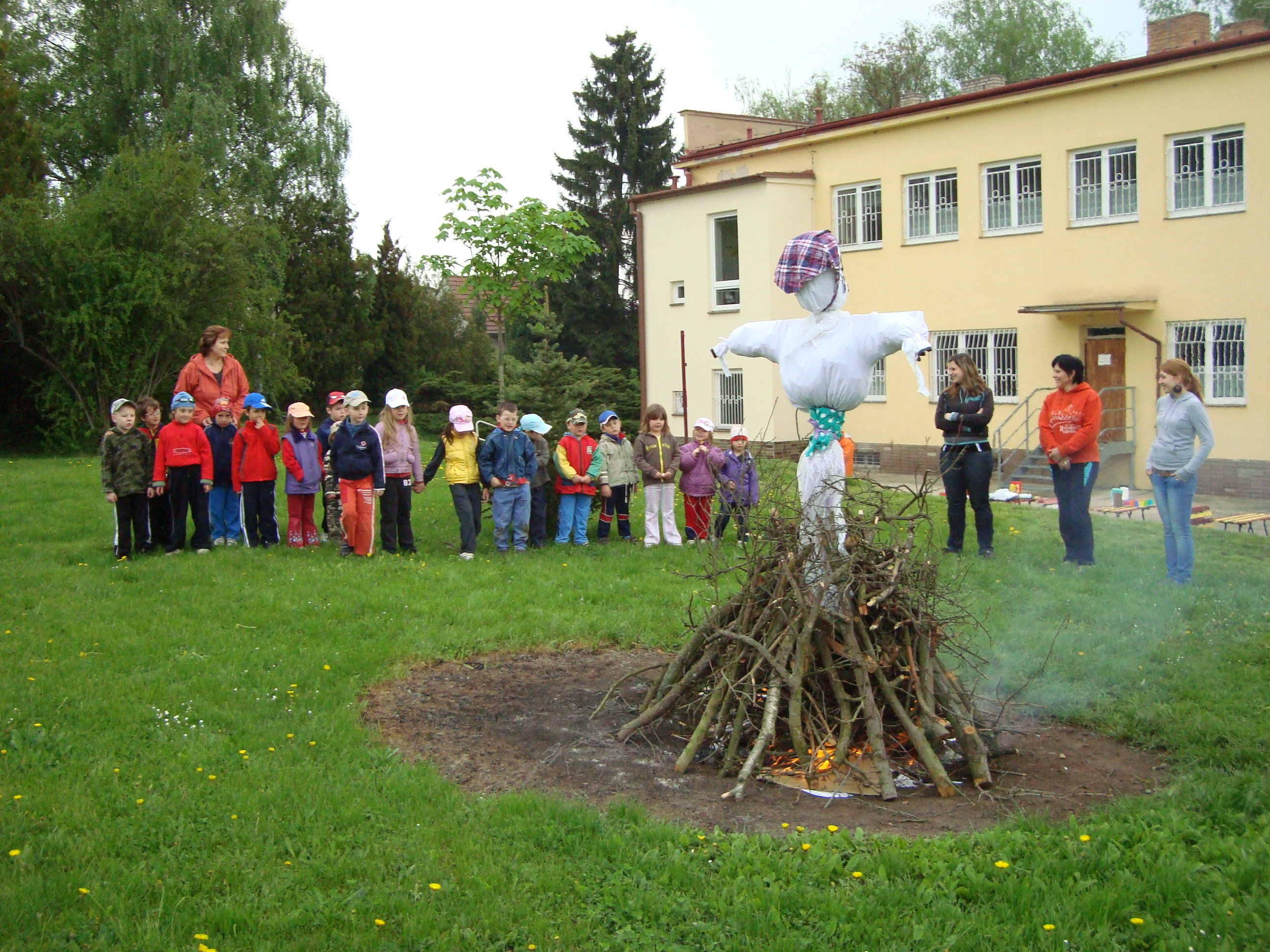 pálení čarodejnic